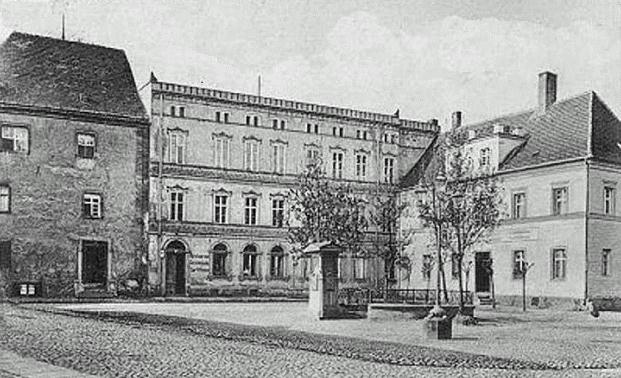 Sorau, Schlossplatz, about 1900